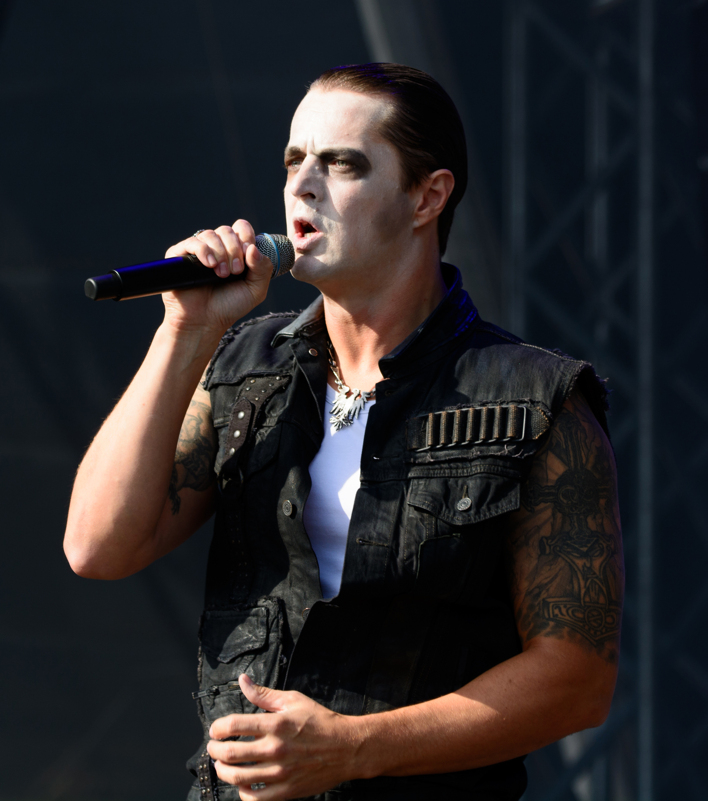 Satyricon beim Elbriot 2018